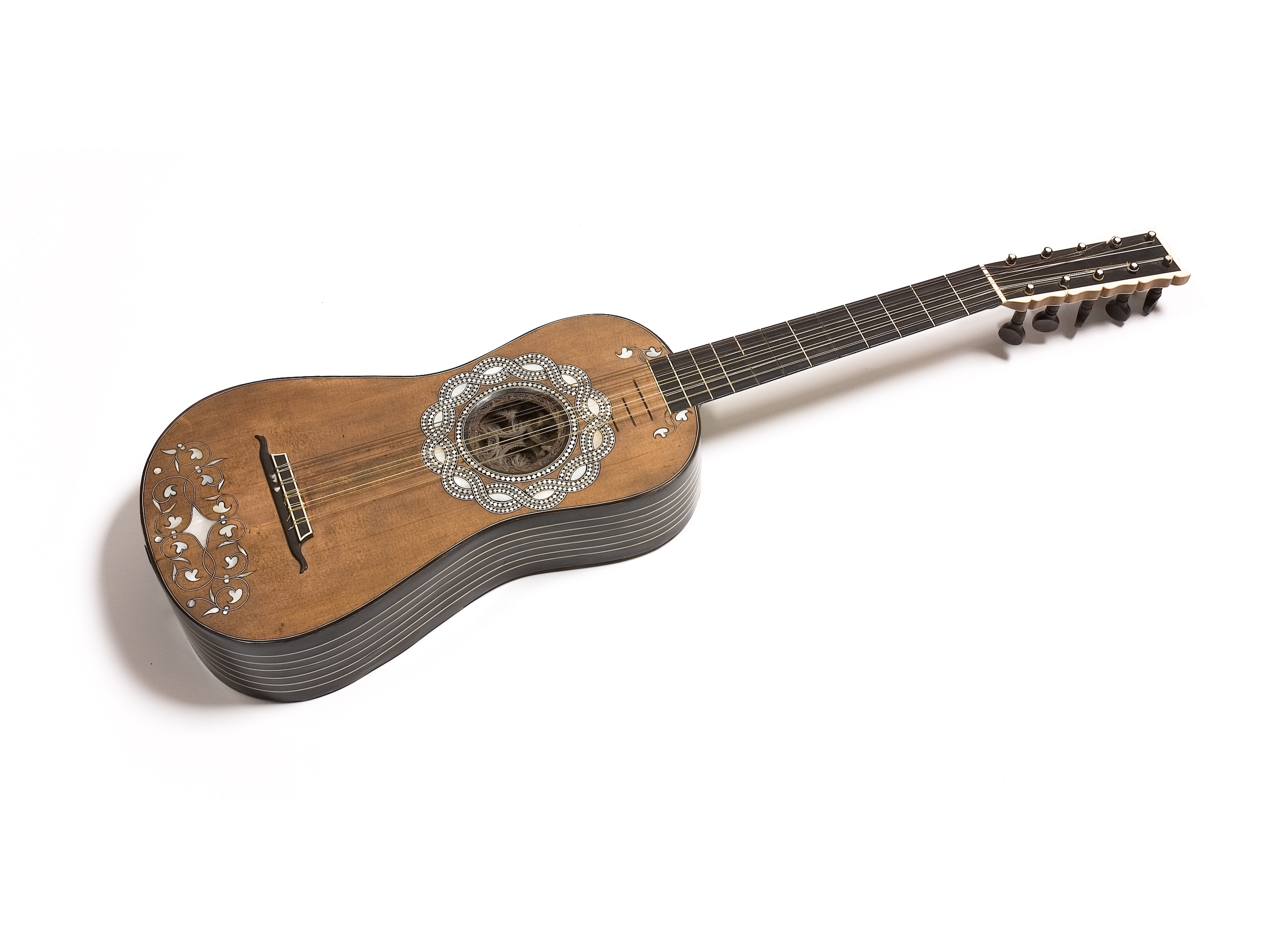 Gitarr, tillverkare Matteo Seelos, före 1653. Foto Olav Nyhus. Ingår i Musik- och teatermuseets instrumentsamling.